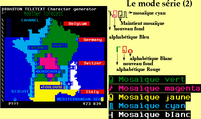 Extrait d'un cours donné à l'Université de Paris Dauphine sur l'histoire du Vidéotex : Page test en mode série avec codes visibles.